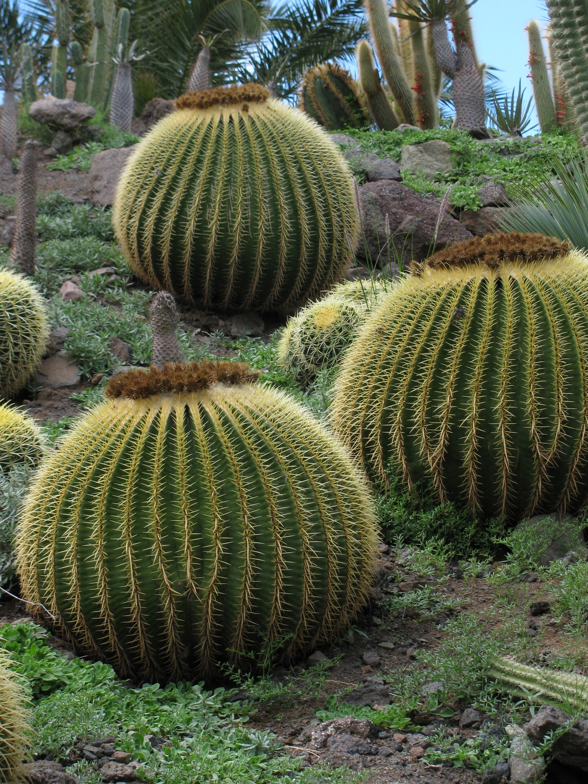 Cactualdea